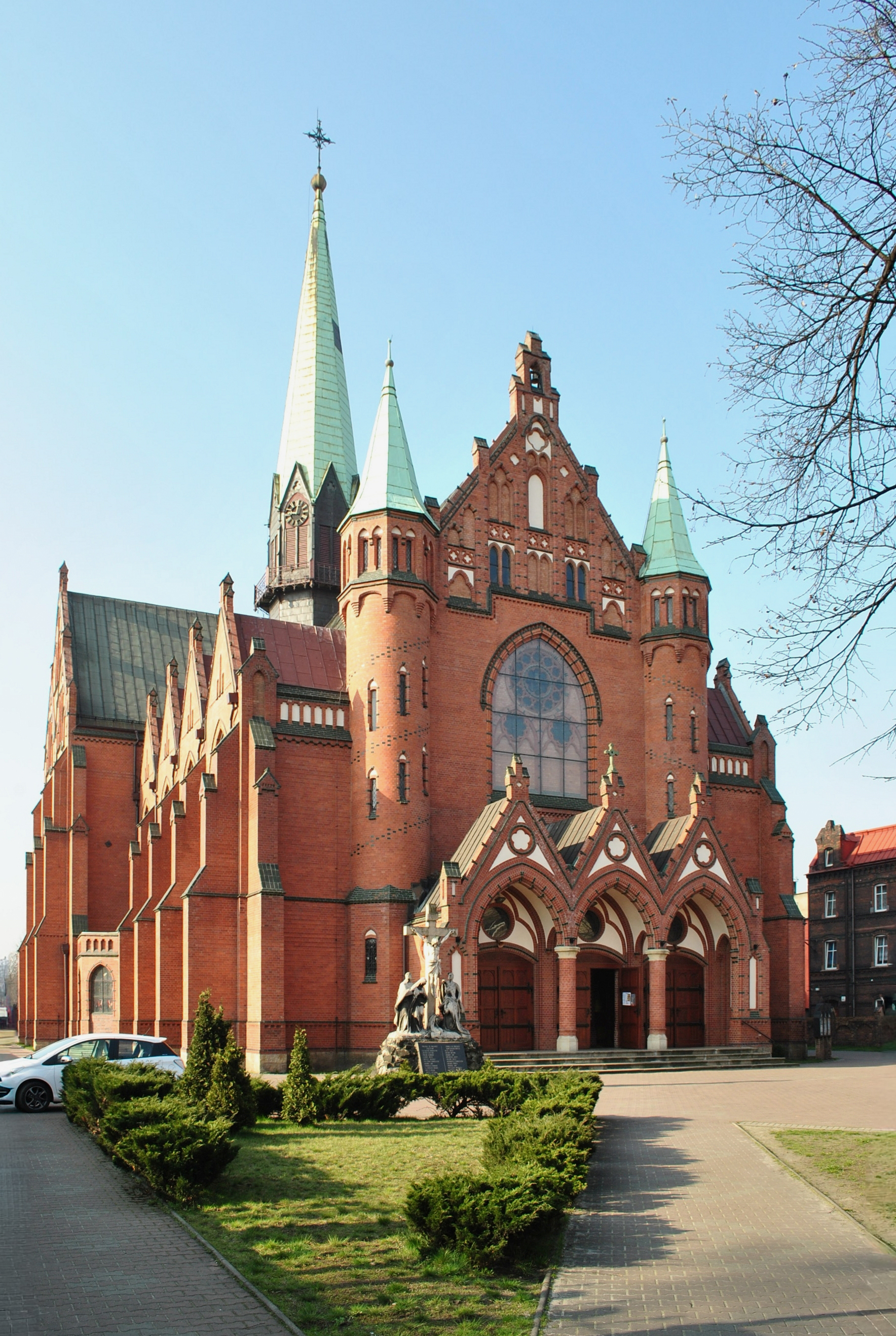 Kościół p.w. św. Józefa położony w Katowicach - Załężu (zabytek nr rejestr. A/1236/78)